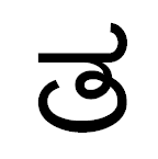 каннада